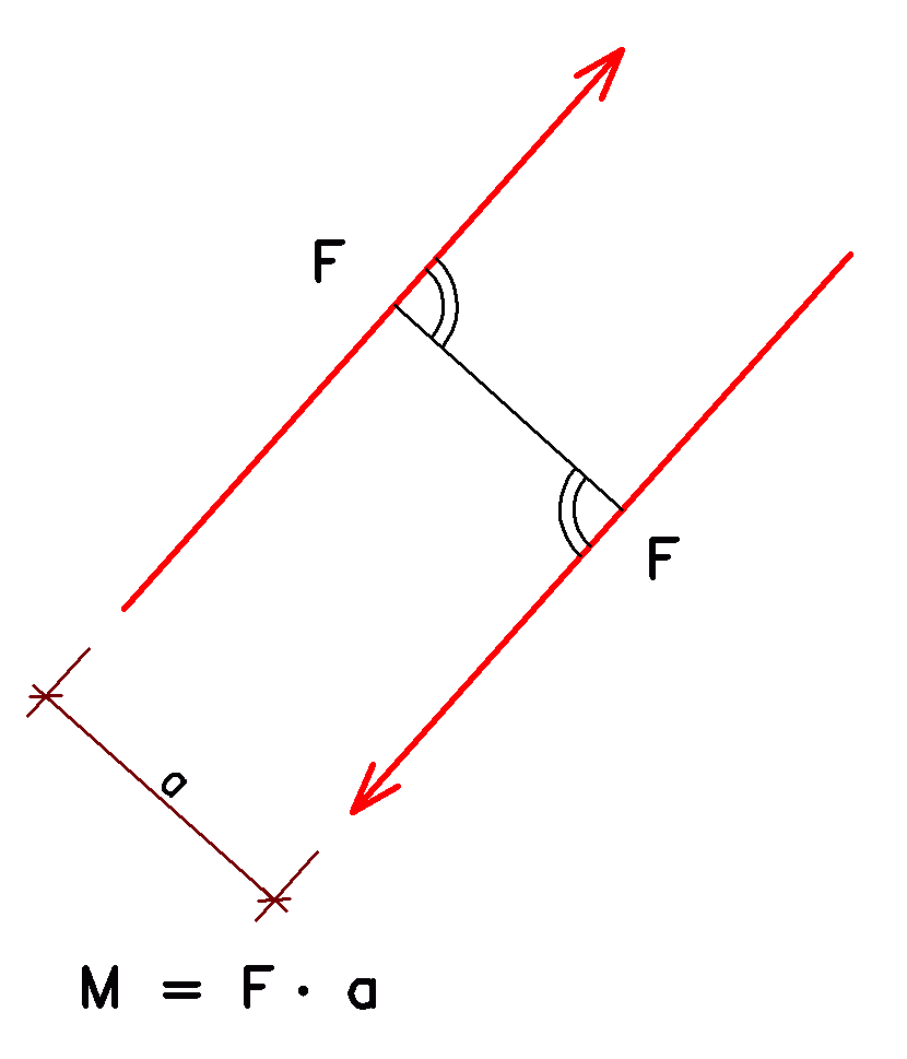 Moment